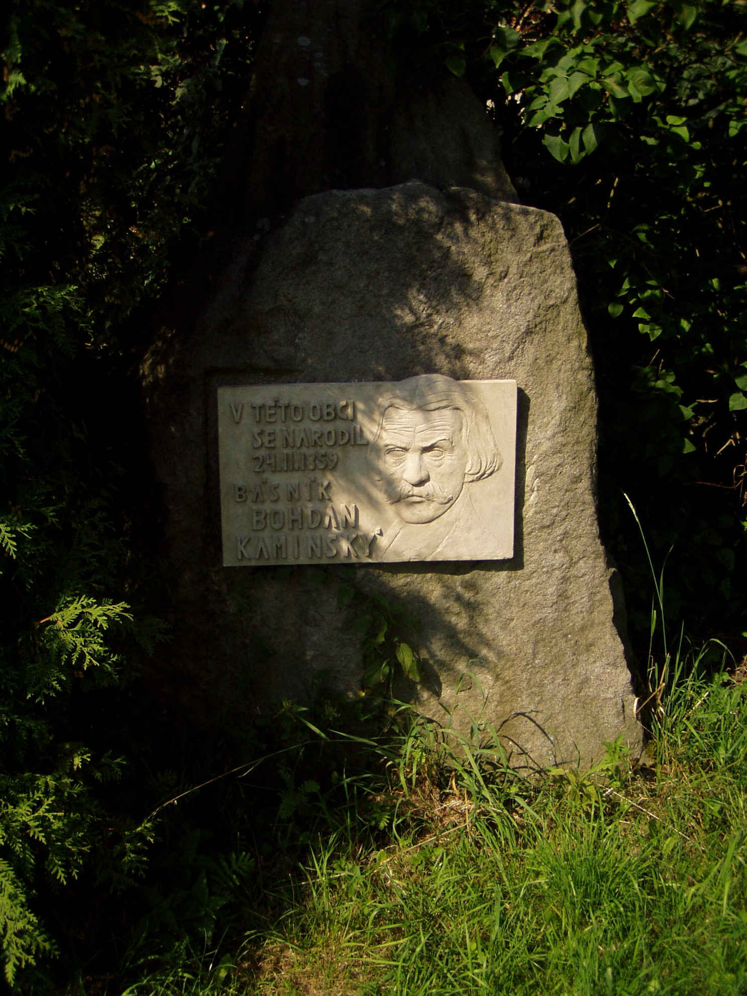 Pamětní deska českého básníka Bohdana Kaminského v jeho rodišti na Huse, dnešní součást obce Paceřice